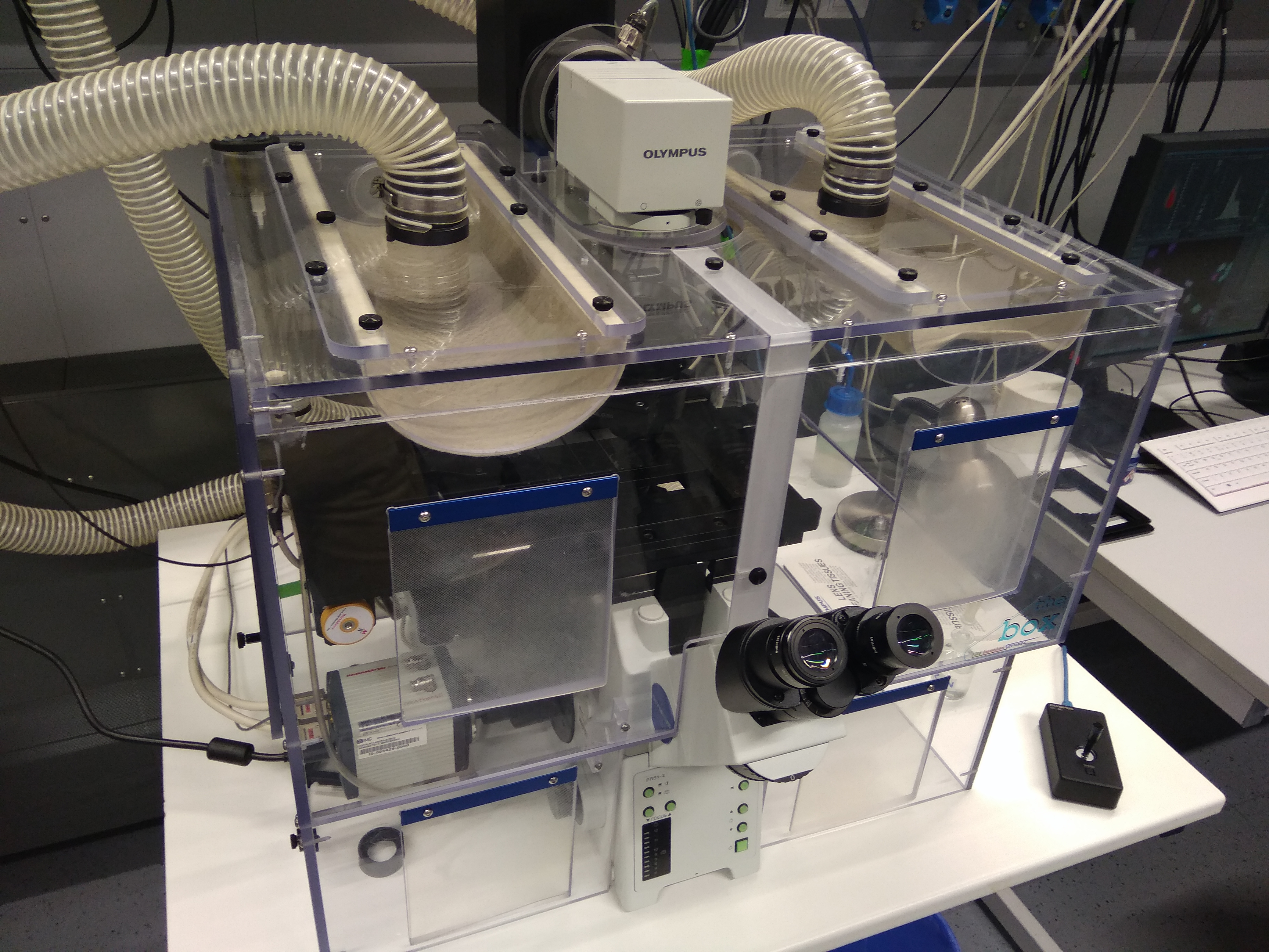 Automatizovaný mikroskop pro obrazovou cytometrii ScanR